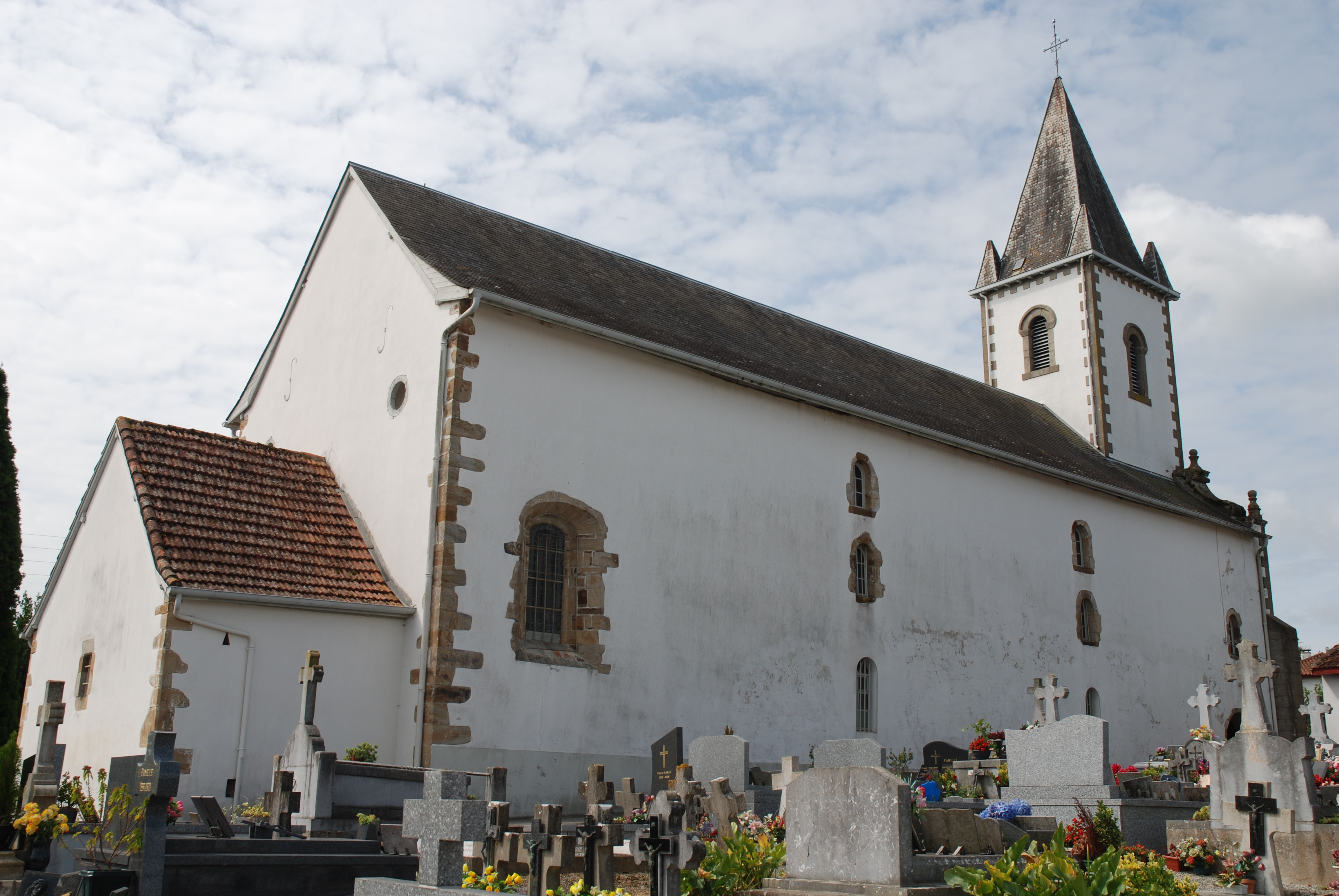 Masparraute, l'église Saint-Etienne